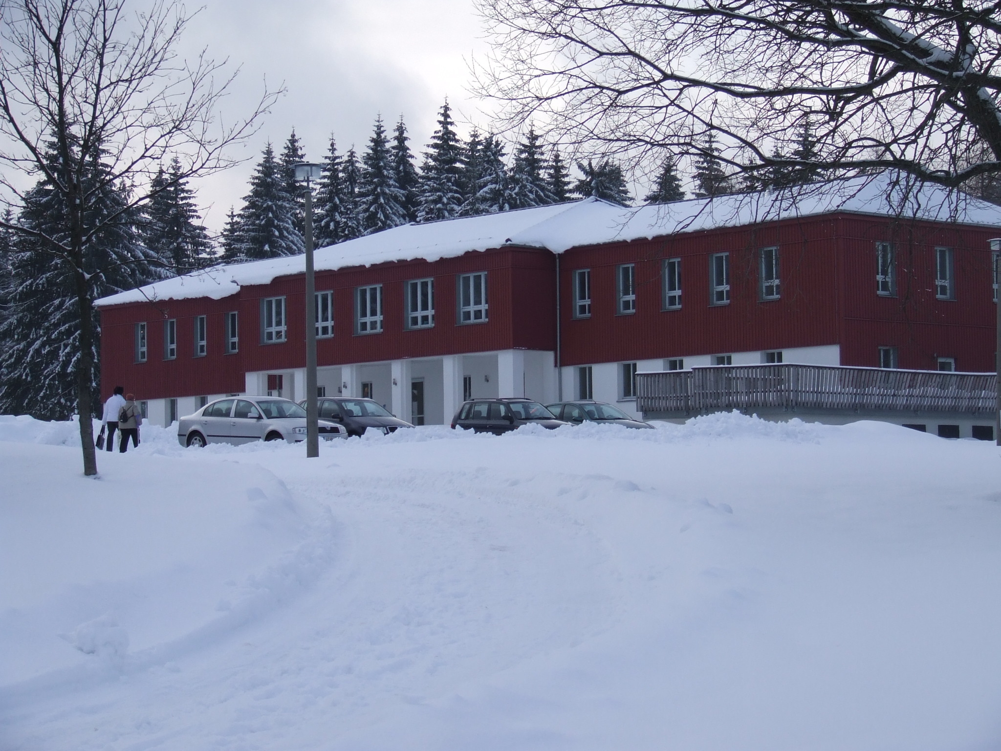 Mineralienzentrum Schneckenstein